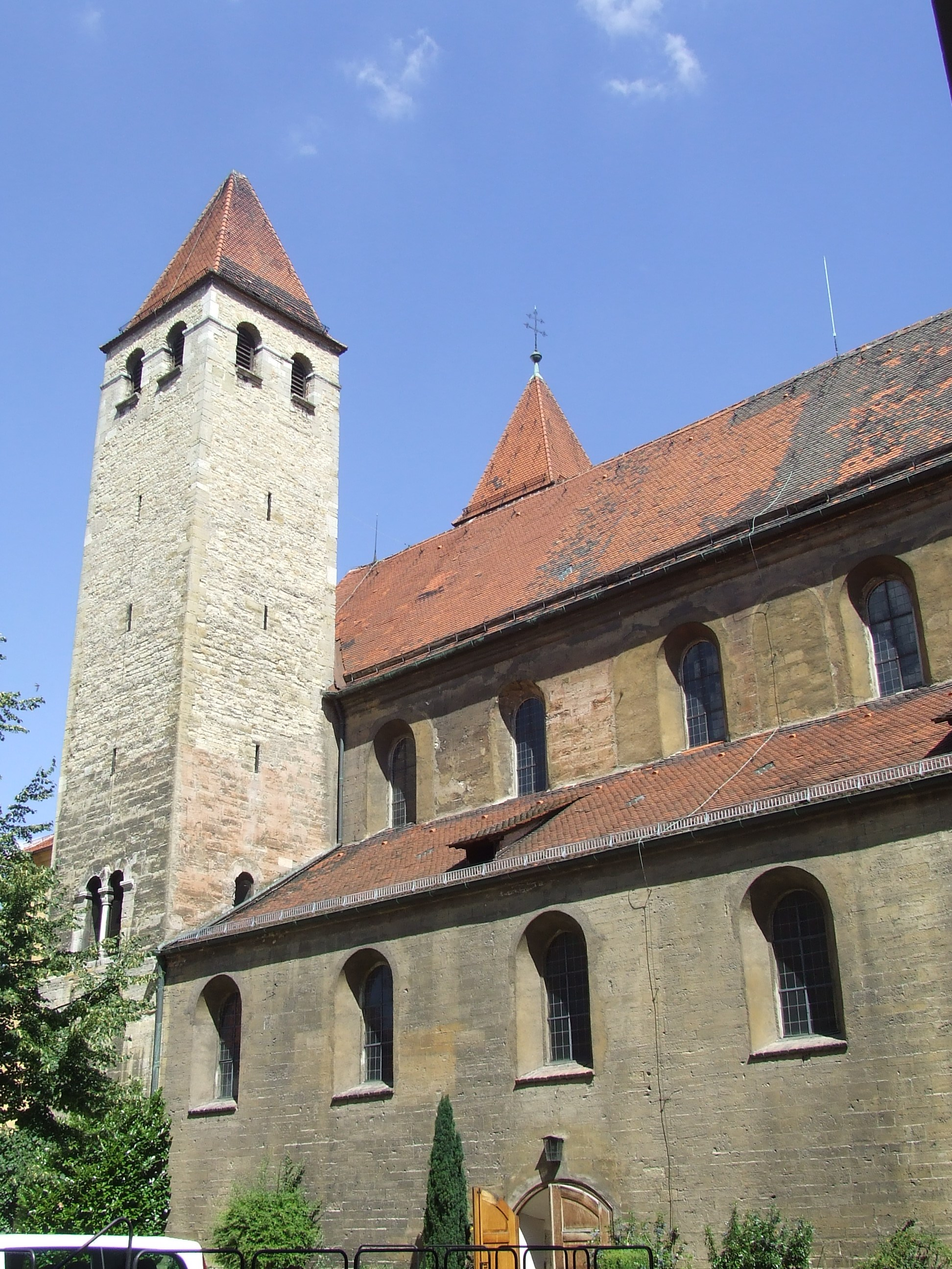 Stadt Regensburg, Niedermünsterkirche von Süden